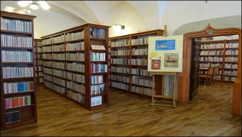 Filia nr 21 Miejskiej Biblioteki Publicznej w Lublinie